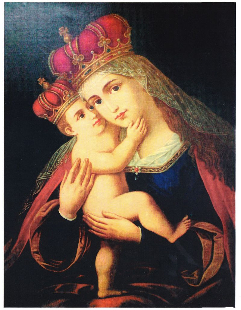 W. Jemielity, Jubileusz 500 - lecia Parafii Waniewo, Wydawca Parafia Waniewo. Waniewo 2011 r. s. 26. Orginał uległ zniszczeniu w 1955 r.